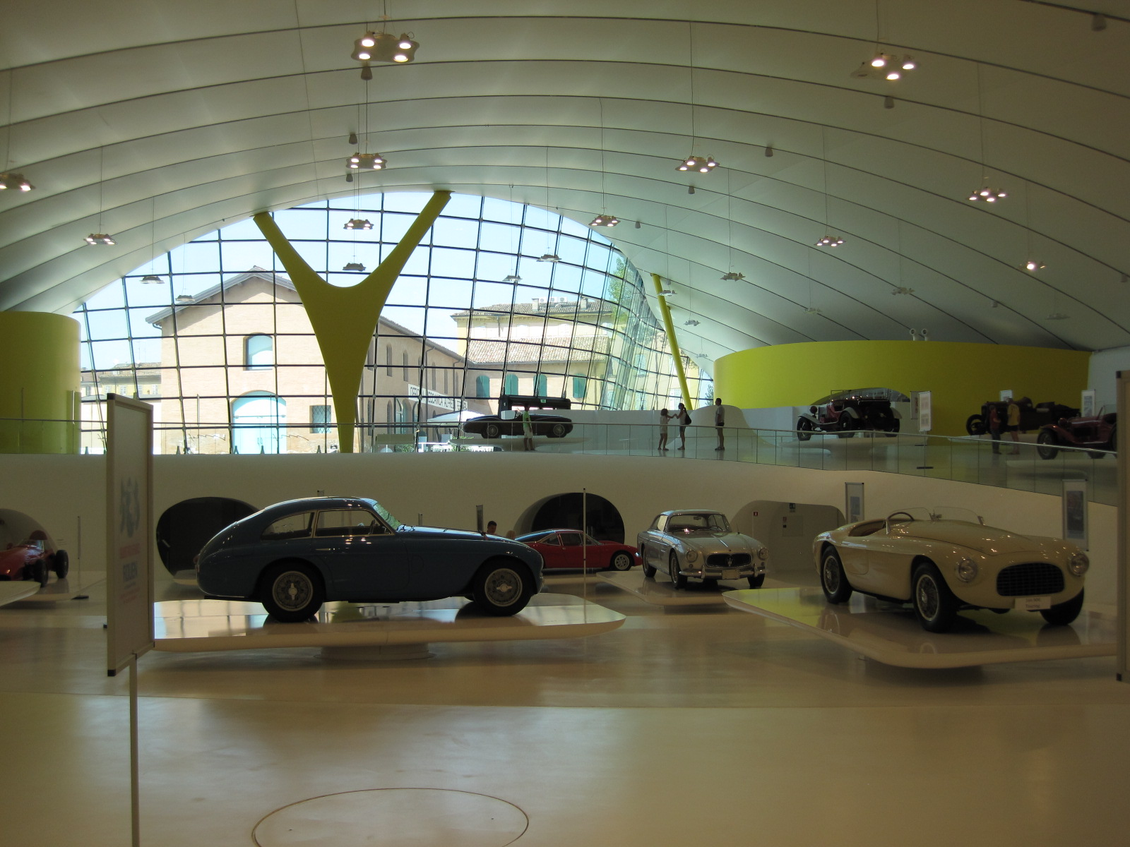 Enzo Ferrari Museum in Modène